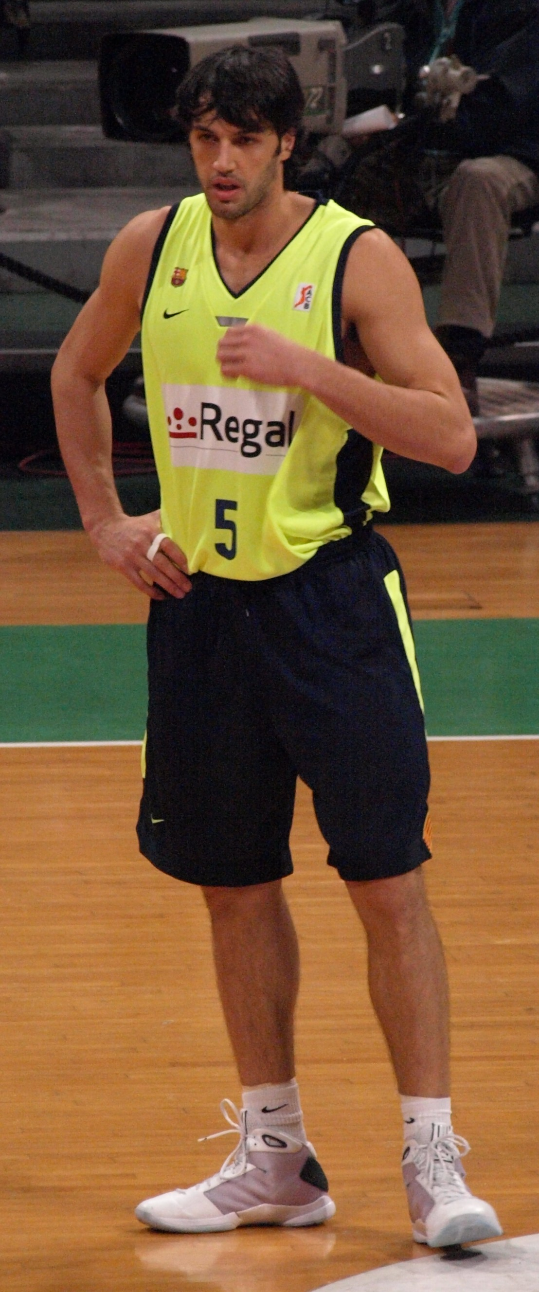 Gianluca Basile, en el partido que enfrentó al FC Barcelona y al DKV Joventut de liga ACB en el Olímpico de Badalona en enero de 2009.